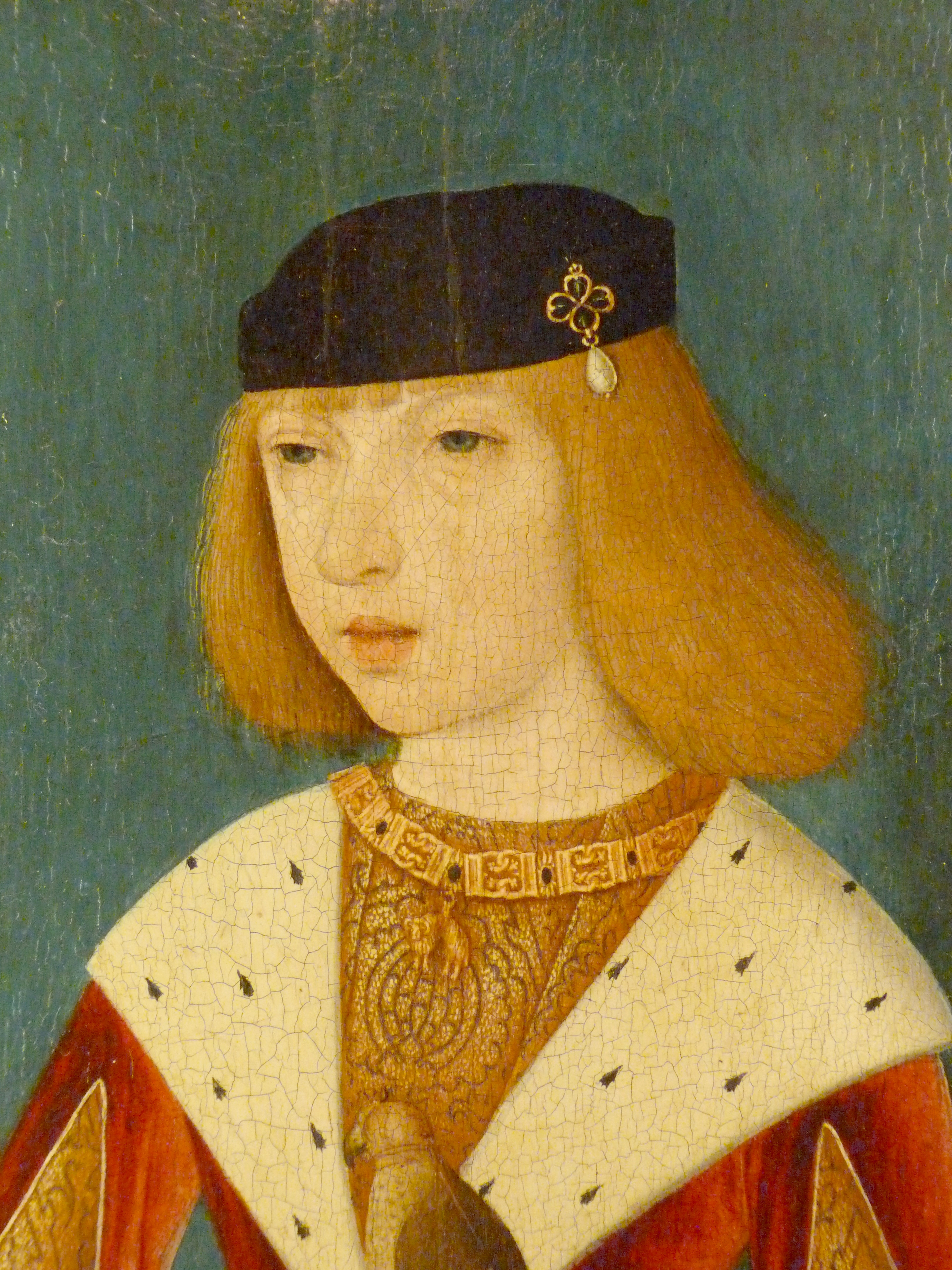 Philippe le Beau (1478-1506) tenant un faucon, (Restitution par assemblage de 3 clichés).